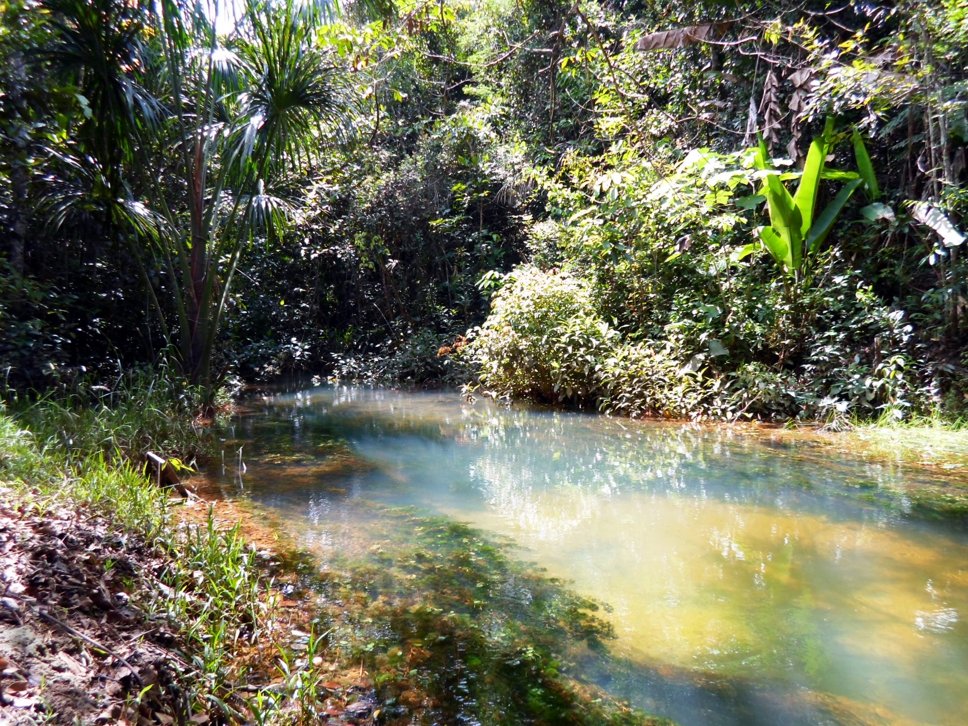 Riacho dentro da área do Centro de Defesa Etino Ambiental Kanindé, próximo a cidade de Porto Velho